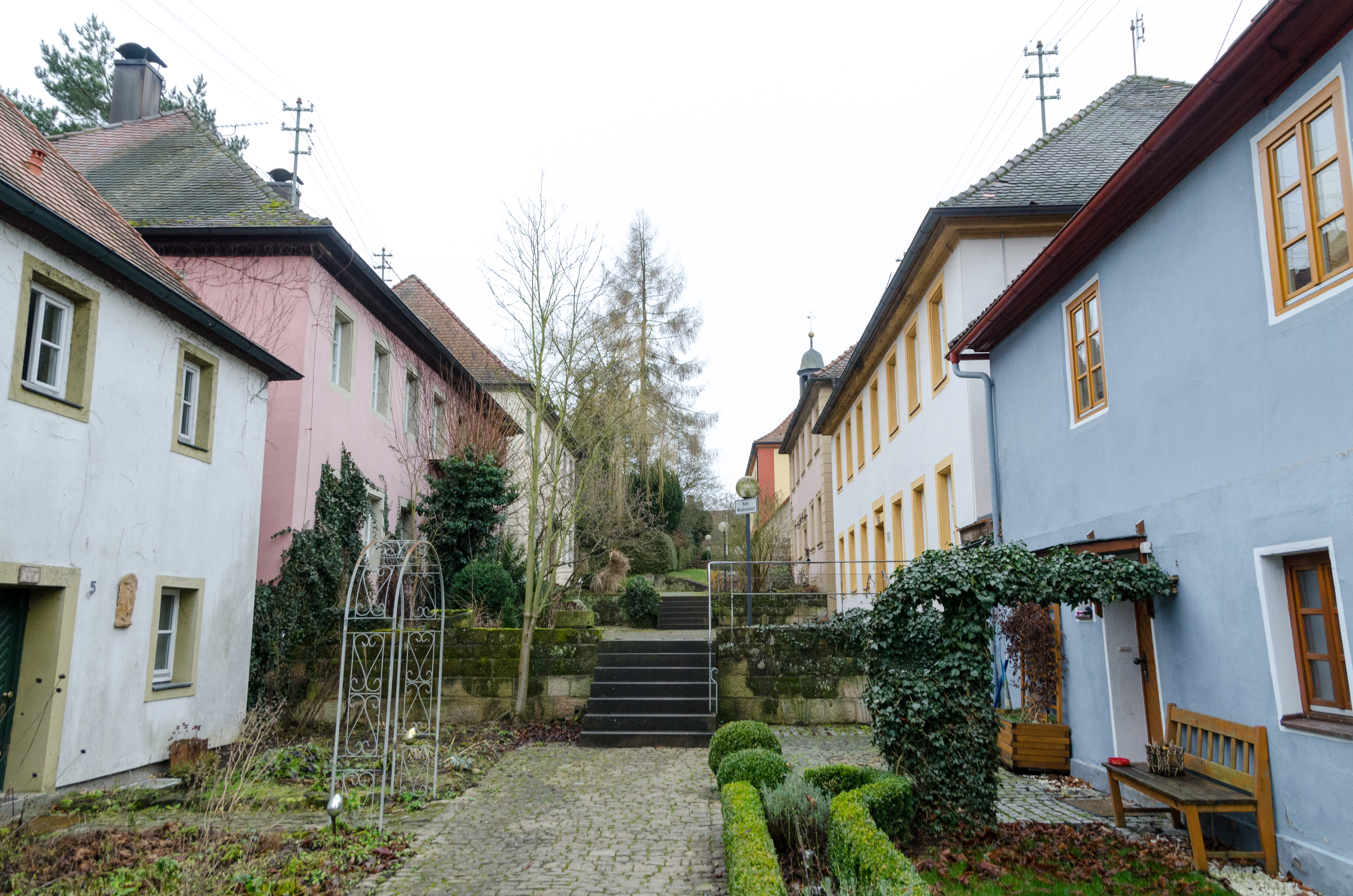 Geiselwind, Rehweiler 5, 7, 9, 8, 6, 4